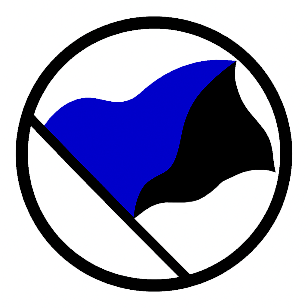 Vlajka Anarchoindividualizmu